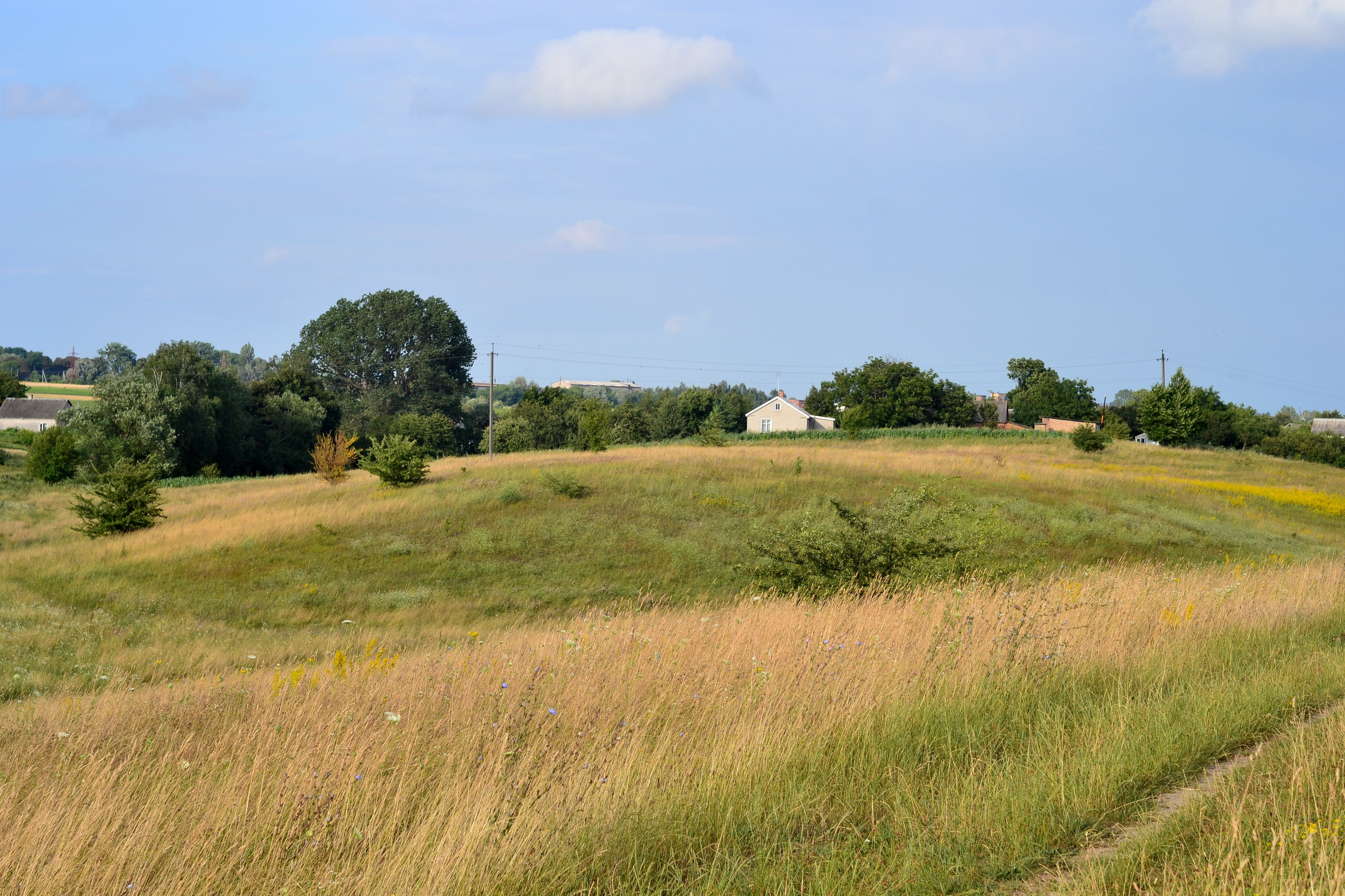 Лежниця-1, поселення багатошарове: доба енеоліту, бронзи, раннього заліза та ранньослов'янського часу - Лежниця (за 0,8 км на південний схід від села, в урочищі «Чуб») Іваничівський район Волинська область Україна